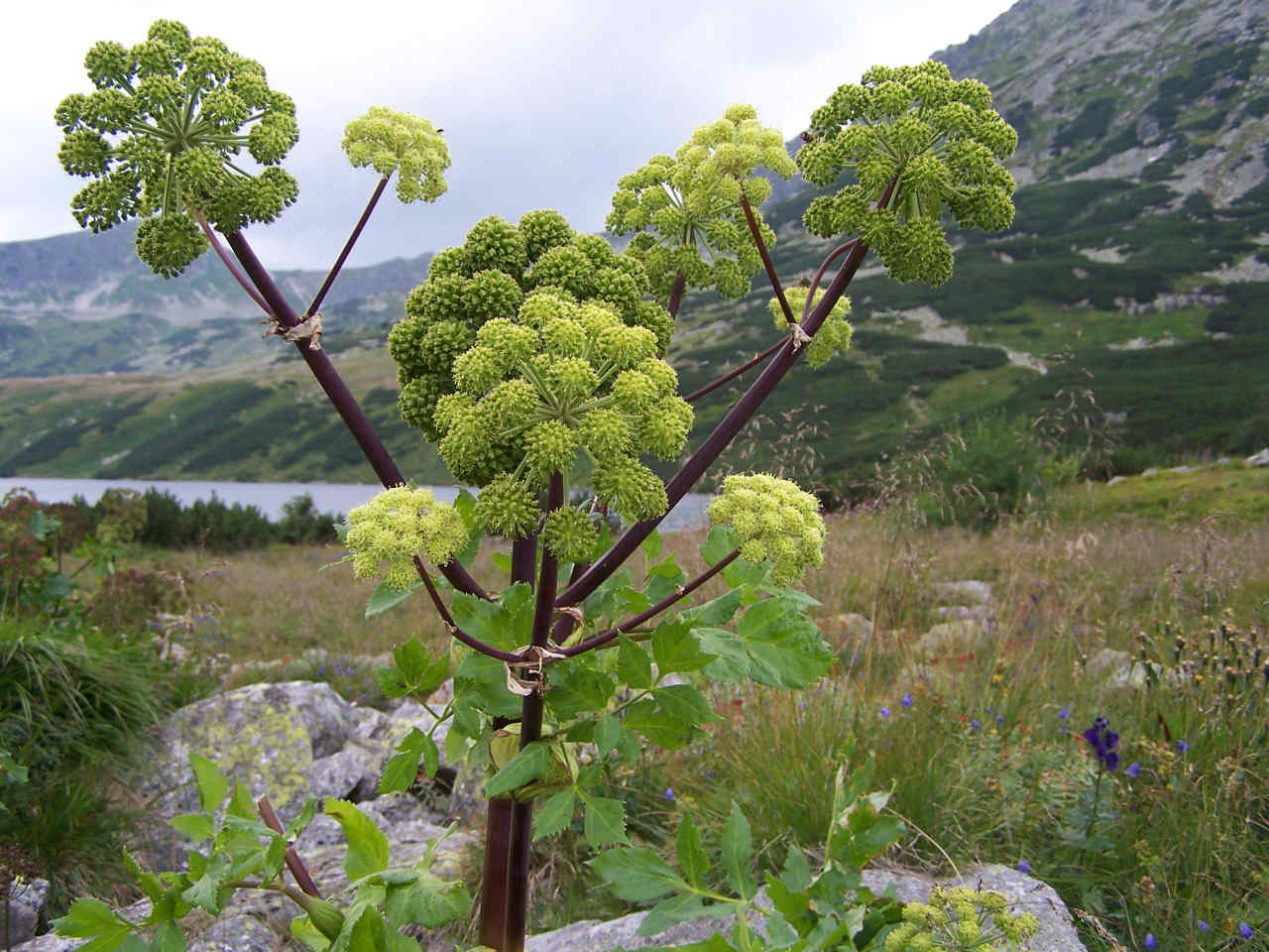 Archangelica officinalis (pl. dzięgiel litwor), habitat: Tatra Mountains, Dolina 5 Stawów Polskich